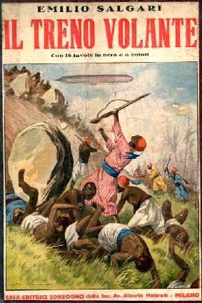 Copertina del romanzo di Emilio Salgari Il treno volante (originariamente edito come La montagna d'oro, 1901), edizione Sonzogno 1928.